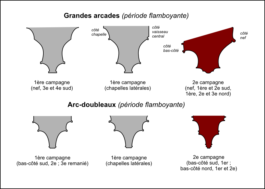 Profils des arcades et doubleaux flamboyants. Esquisse de principe, approximation, sans échelle.